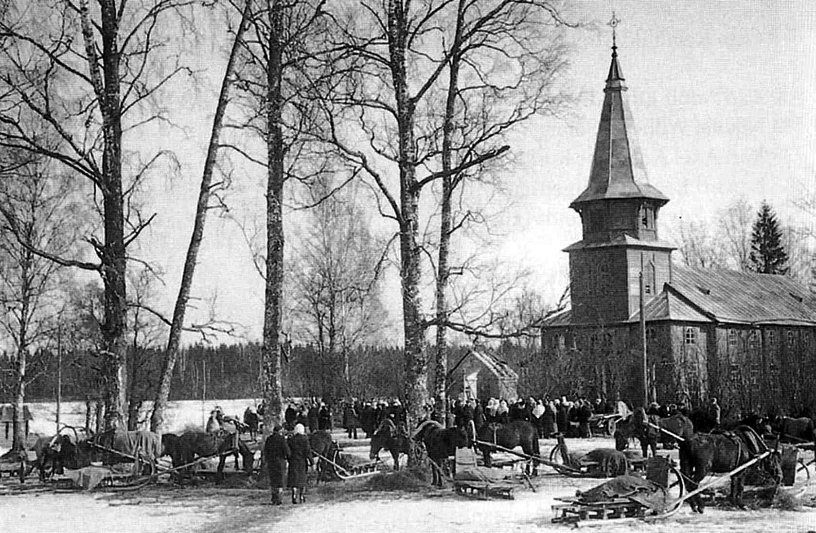 Кобринская кирха. 1911 г.